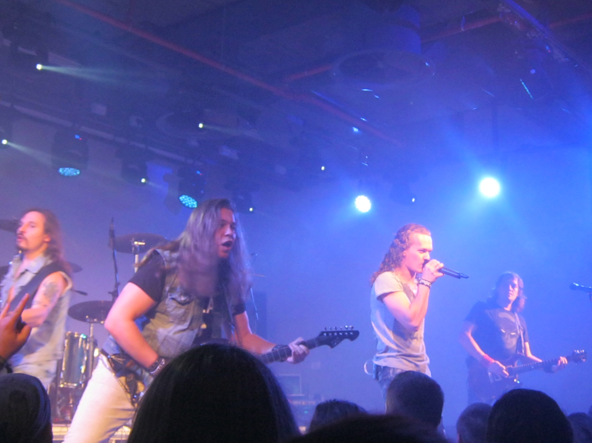 Russian Power Metal band Epidemia in Israel, 2015